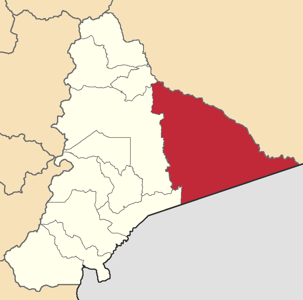 Mapa localizador del cantón en Morona-Santiago, Ecuador